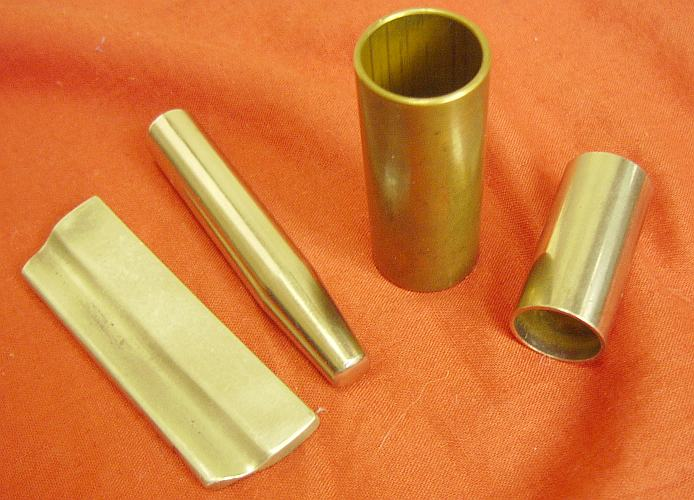 Summary Bildbeschreibung: Werkzeuge des Slide-Gitarristen: massive Steel Bars oder Bottlenecks aus Metall Quelle: eigenes Foto ... Fotograf/Zeichner: bodoklecksel 16:56, 3. Apr 2006 (CEST) Datum: 2006 Sonstiges: ...